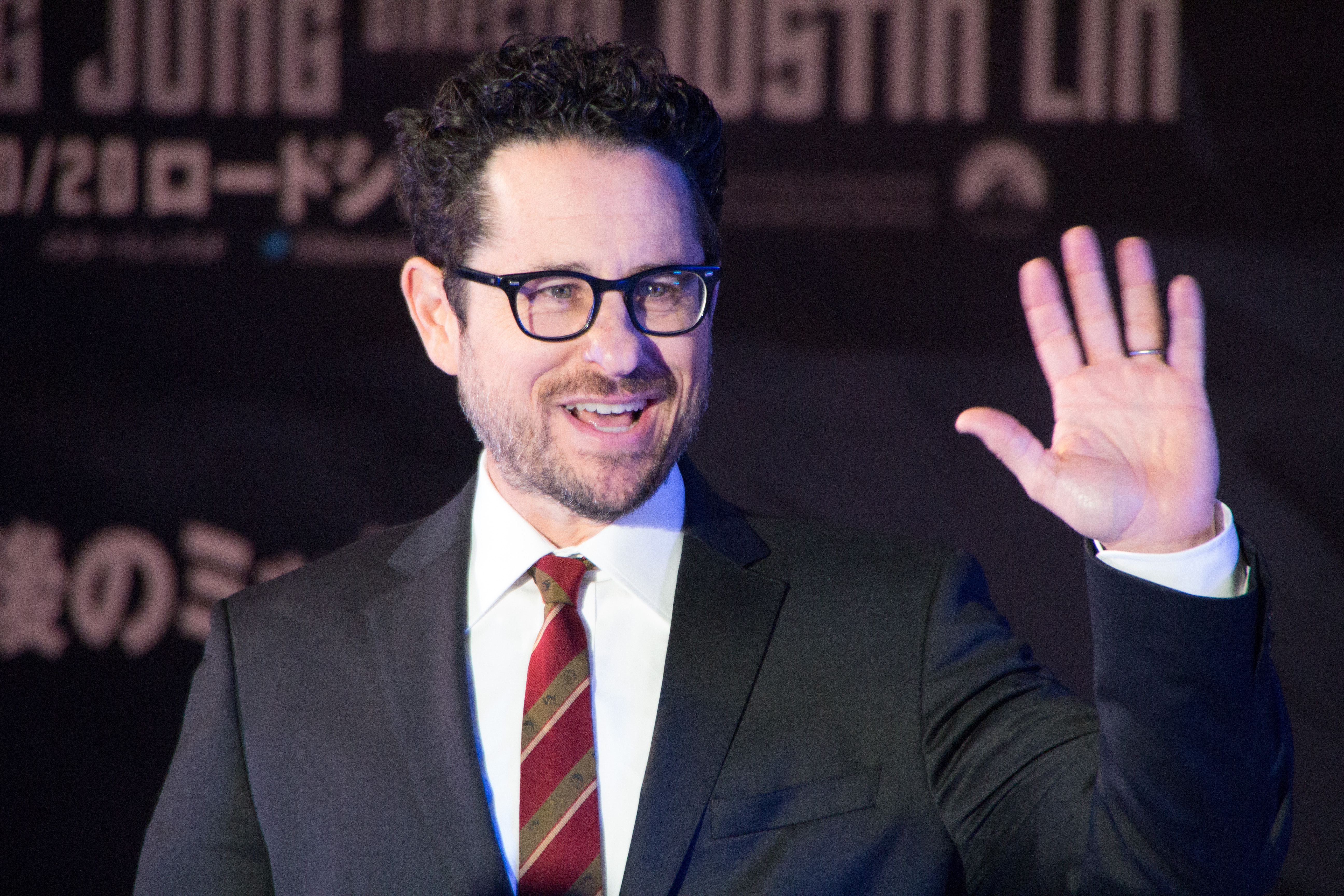 スター・トレック BEYOND ジャパン・プレミア レッドカーペット J・J・エイブラムス